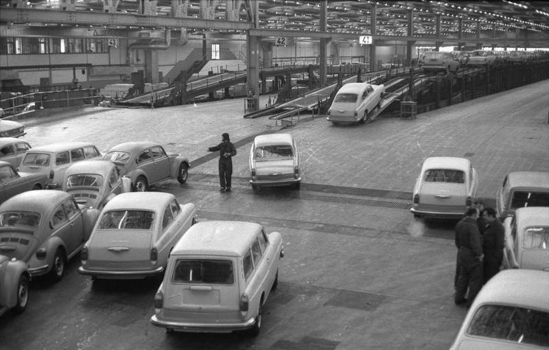 VW-Werk, Wolfsburg Verladebahnhof - Verladen der Fahrzeuge auf Waggons